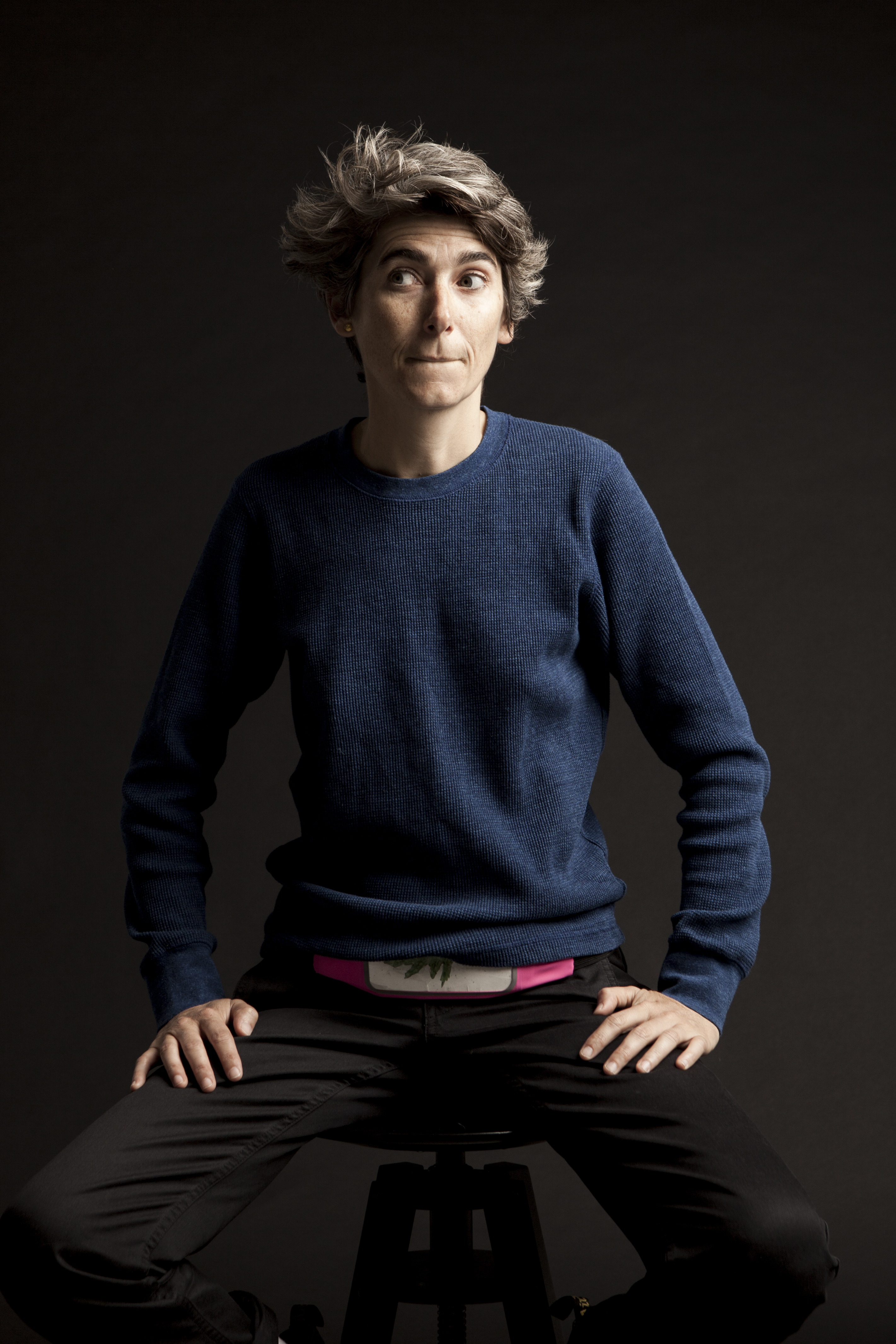 Ana Carolina (comediante)